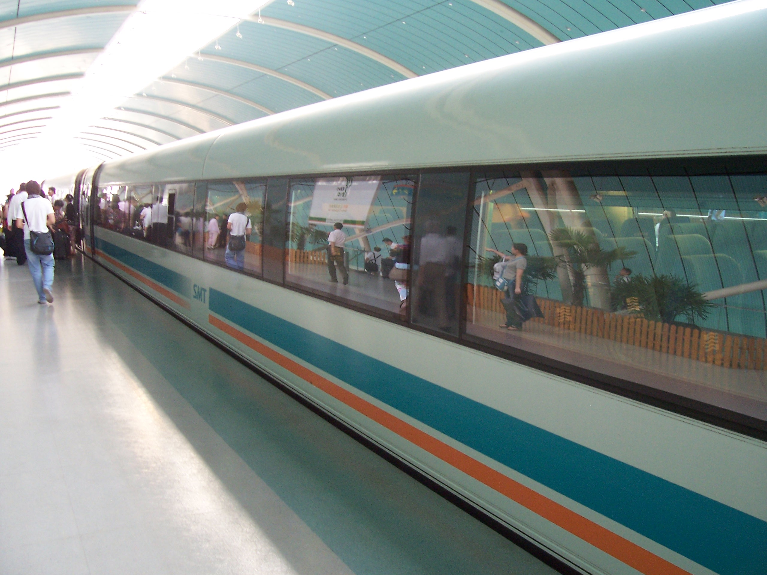 Seitenansicht des Maglev / Transrapid in Shanghai